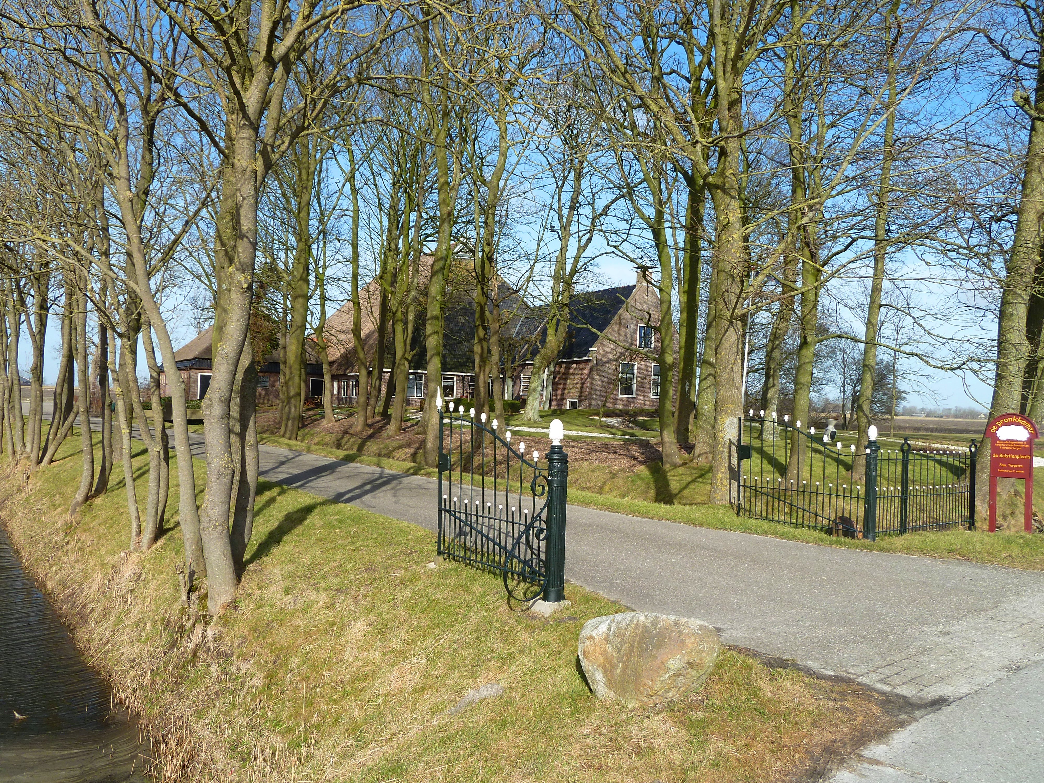 Boerderij Bolstienpleats nabij Aalsum.